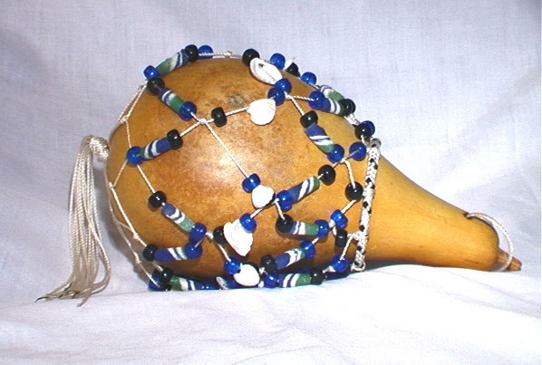 Photographie d'un chekeré